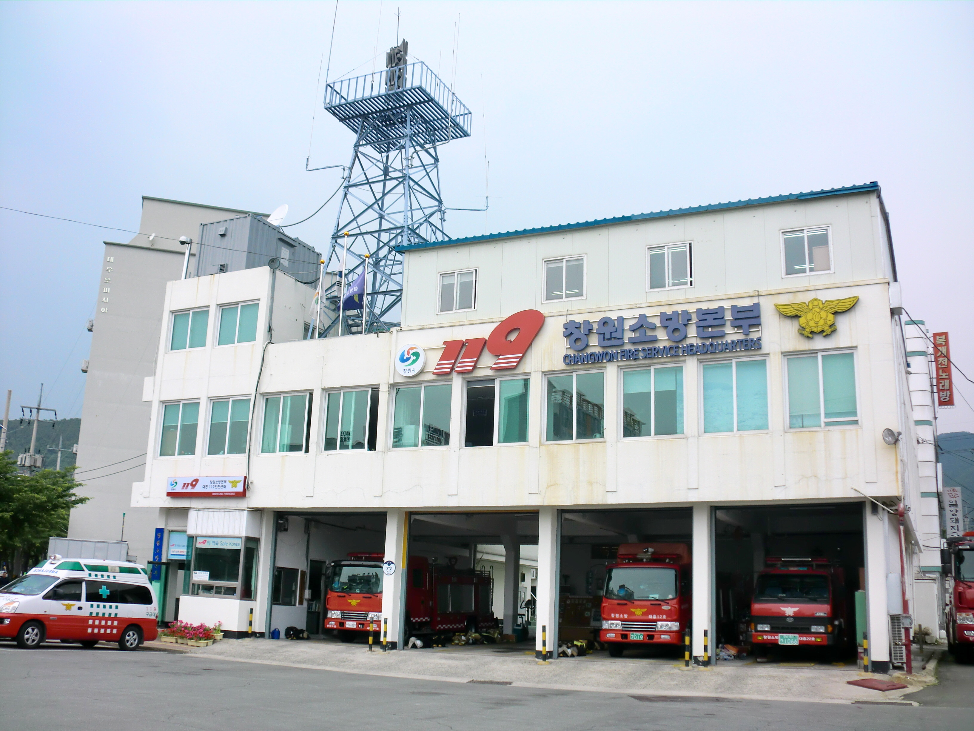 경상남도 창원시 진해구에 있는 창원소방본부